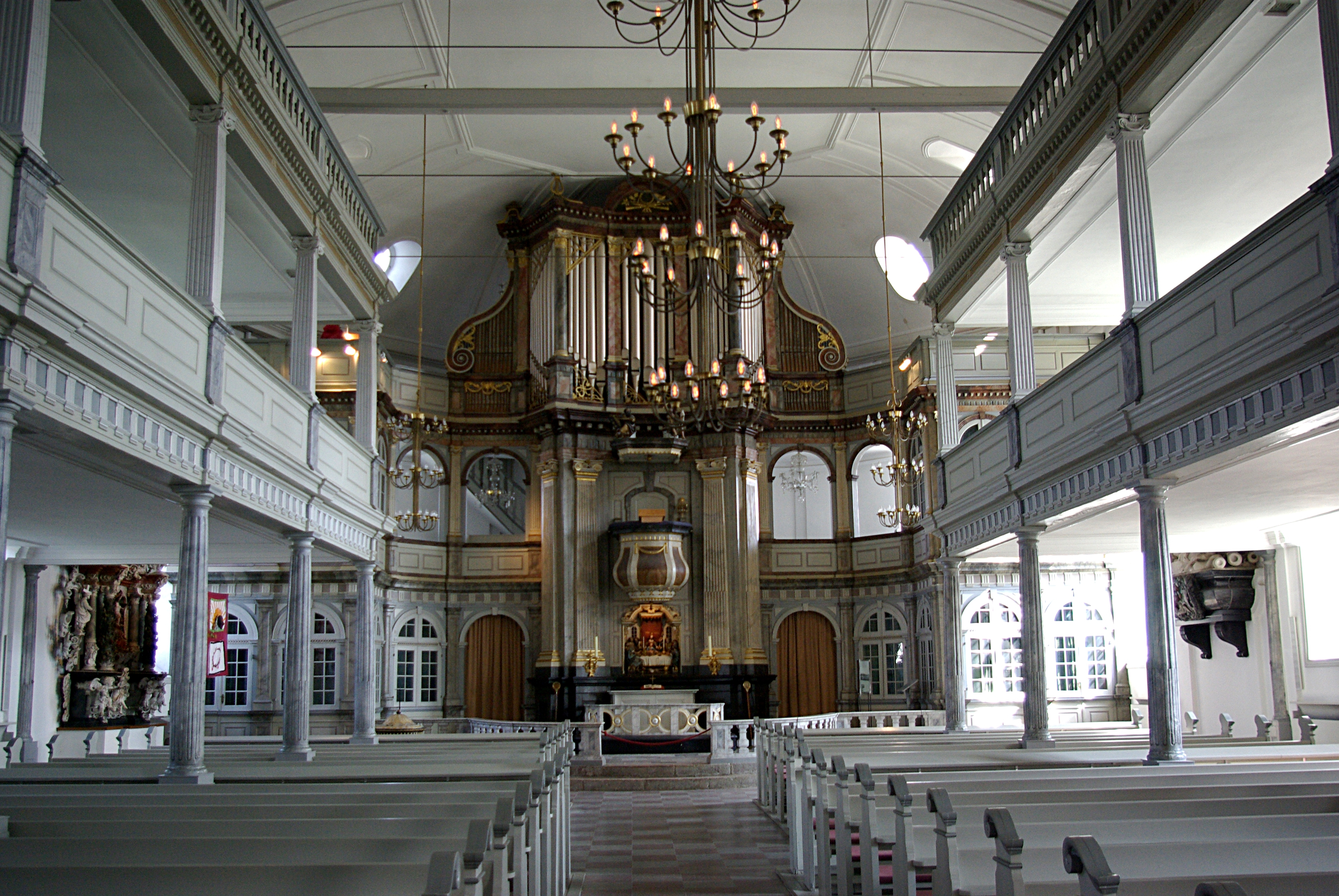 Kappeln in Schleswig-Holstein. Die Kirche steht unter Denkmalschutz. Zu sehen ist der Altar.